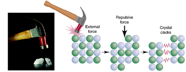 Konposatu ionikoak hauskortasuna